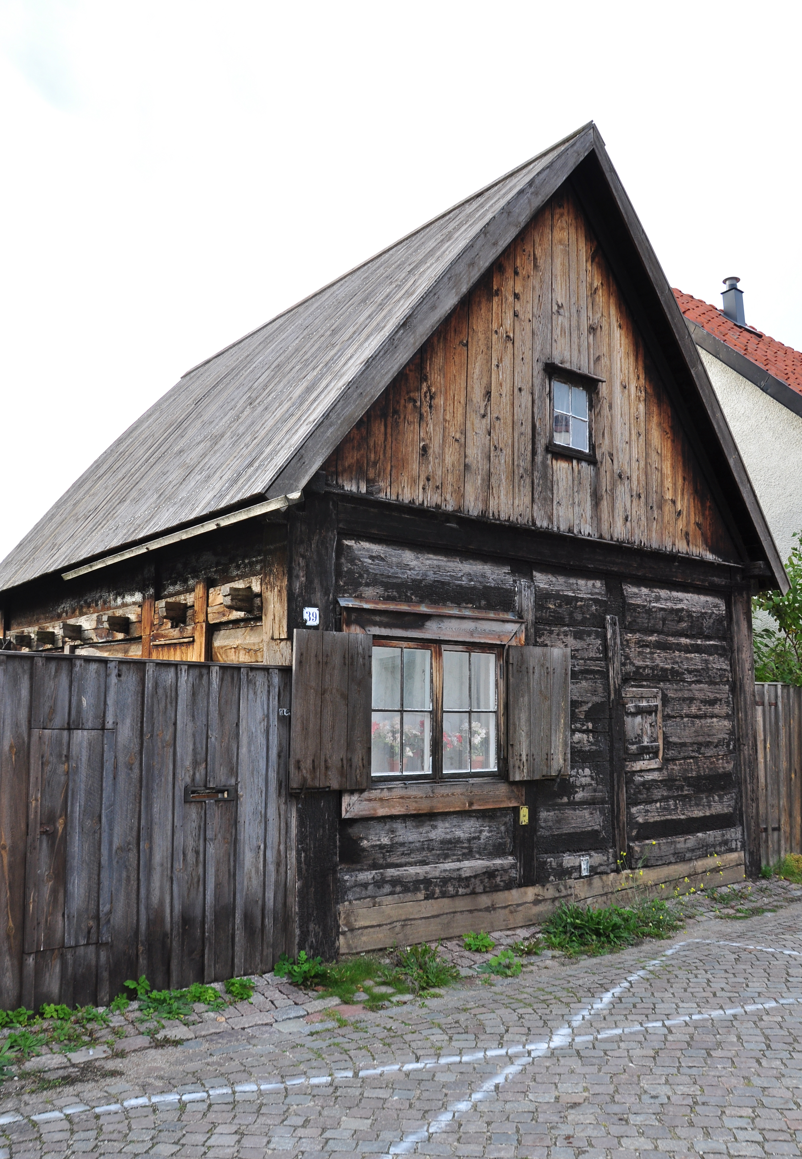 Gotlands kn, Visby Porten 3, KV PORTEN 3, 21300000013988